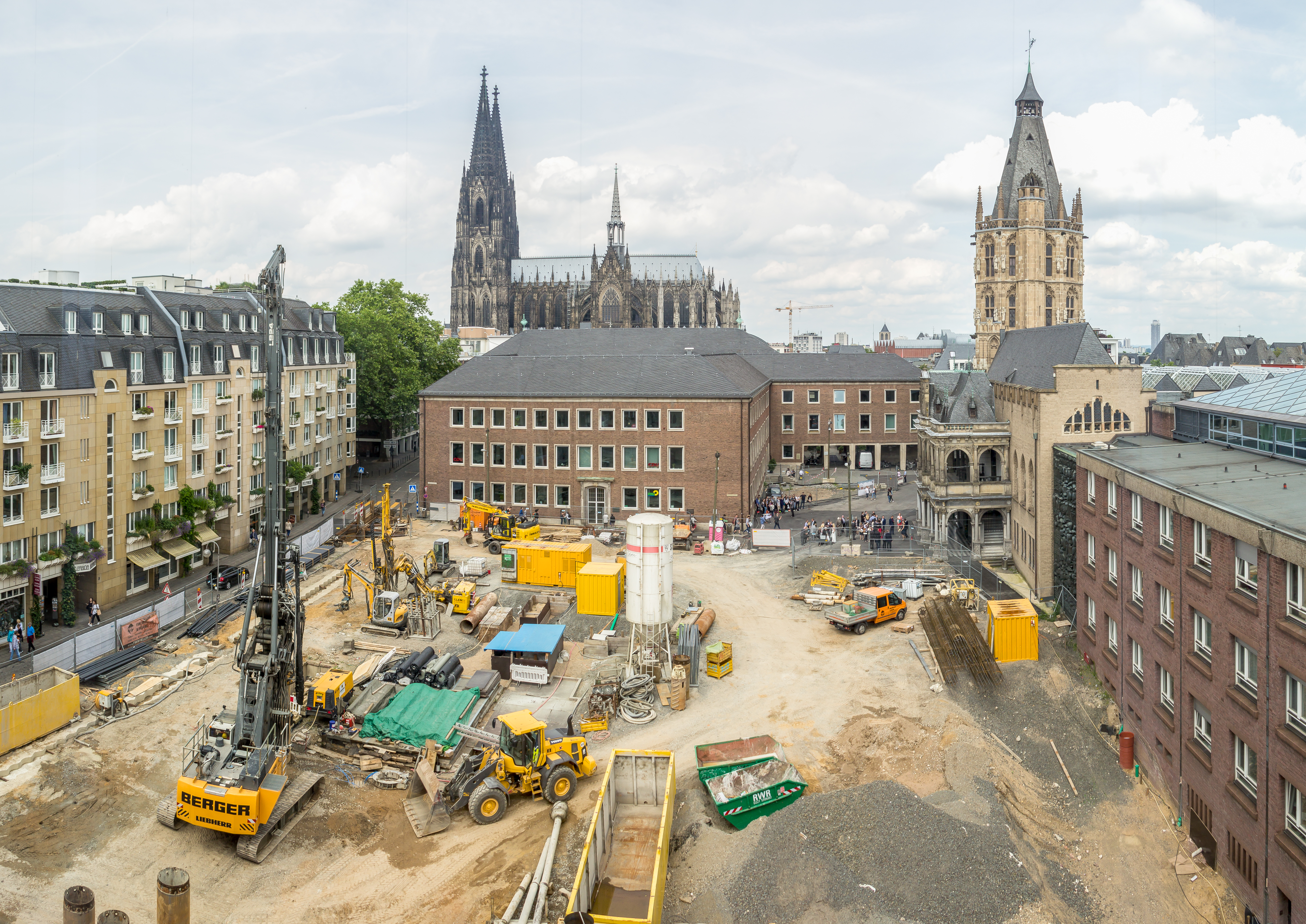 Archäologische Zone Köln - Juli 2016. Pfahlgründungen für den NeubauFoto: Drehbohrgerät Liebherr LB24 (links) bei der Arbeit